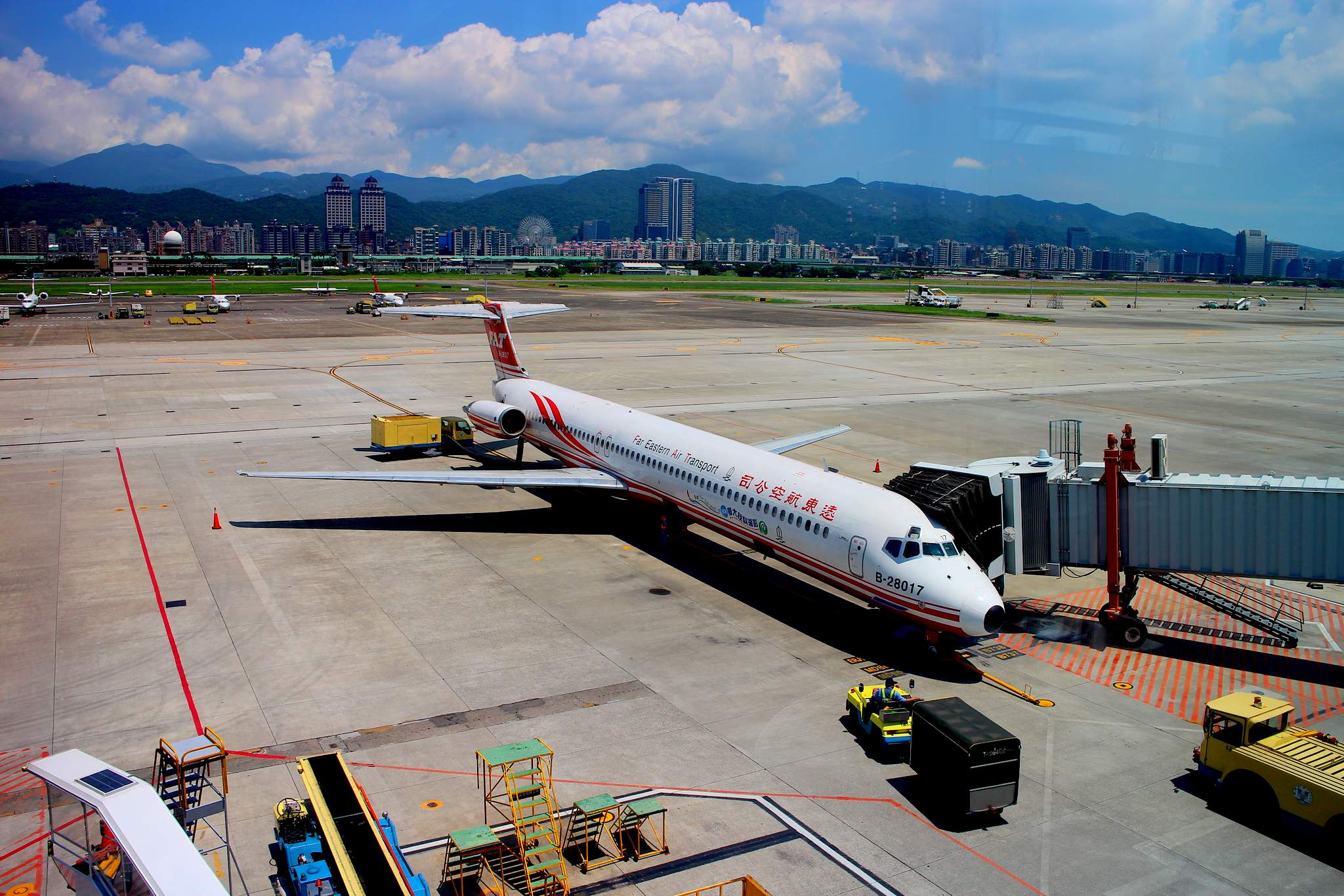 停放於台北松山機場的遠東航空-B-28017班機(MD-82機型)